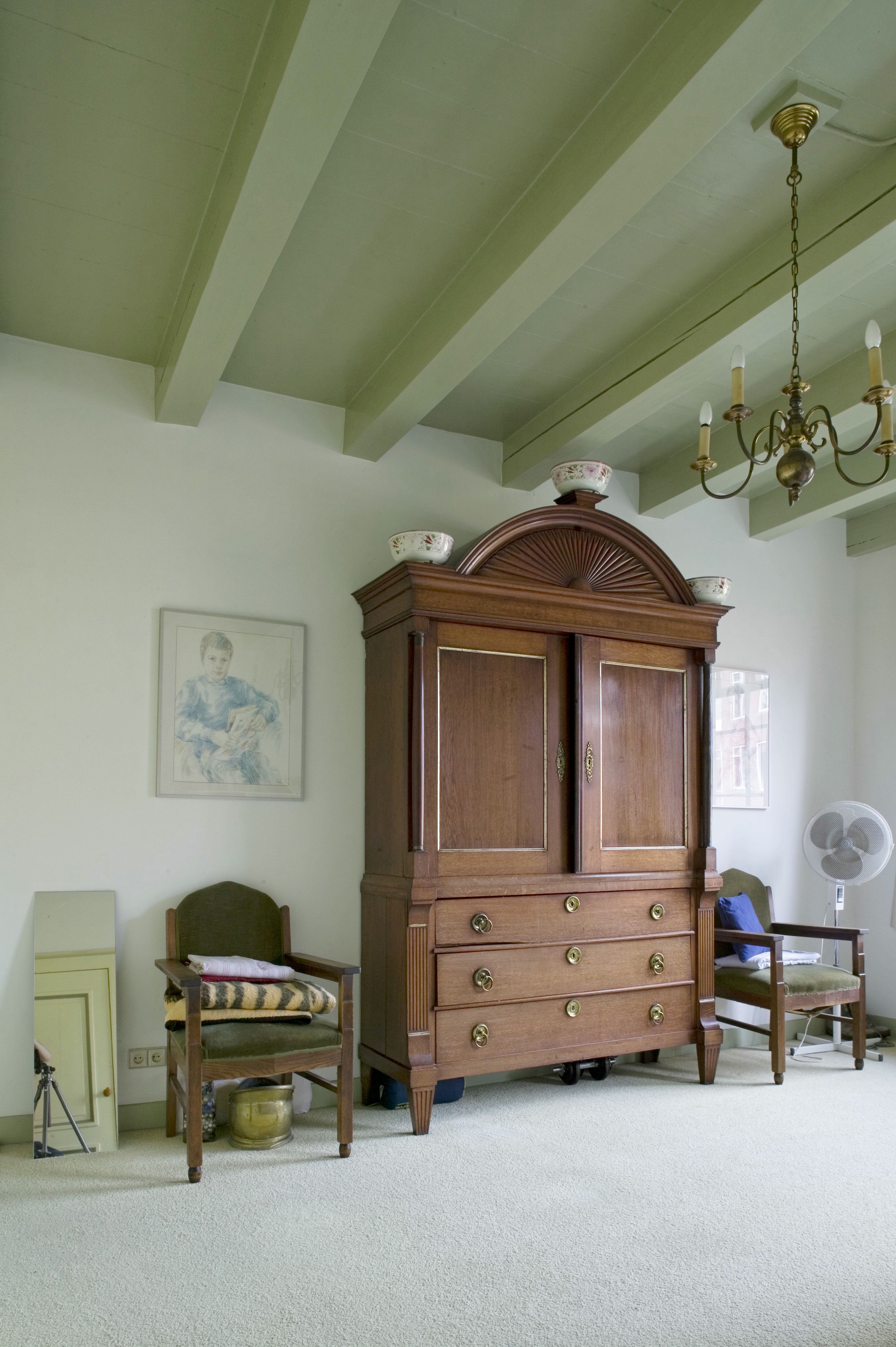 Kast: Interieur, antieke kast in slaapkamer op de eerste verdieping, Drents boogkabinet (opmerking: Foto's genomen i.v.m. aanwijzingsprocedure)